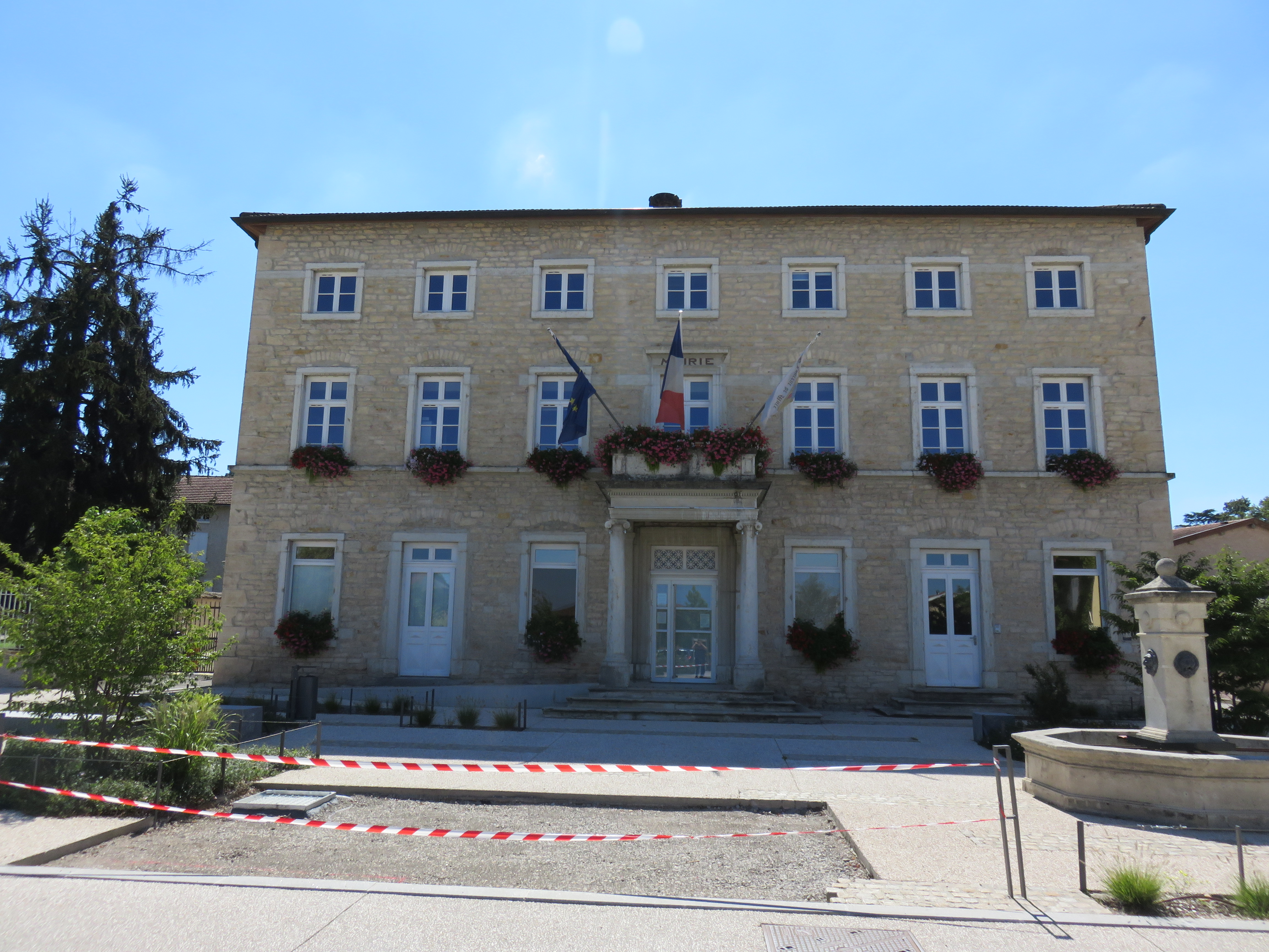 Mairie de Saint-Laurent-de-Mure (Rhône, France).